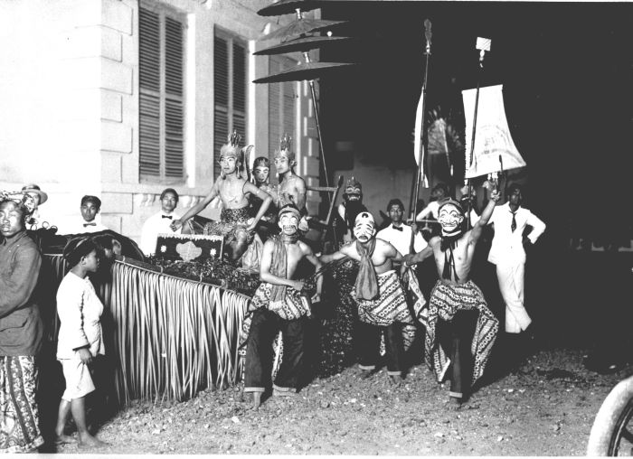 Foto. Aangeboden aan Zijne Excellentie den Gouverneur-Generaal van Nederlandsch-Indië ter gelegenheid van de opening der Rechts Hoogeschool te Batavia. Een van de mooie praalwagens ter gelegenheid van de opening van de rechtshogeschool